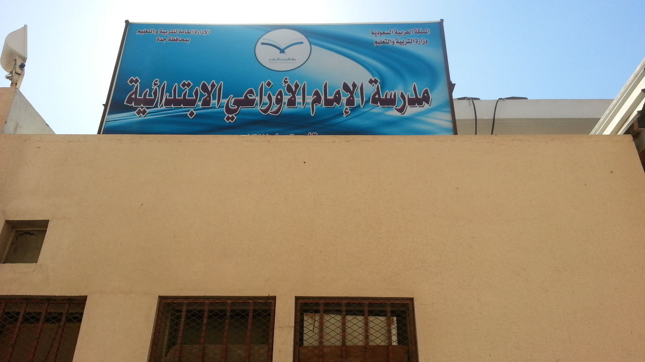 ابتدائية الامام الاوزاعي - حي الجامعة